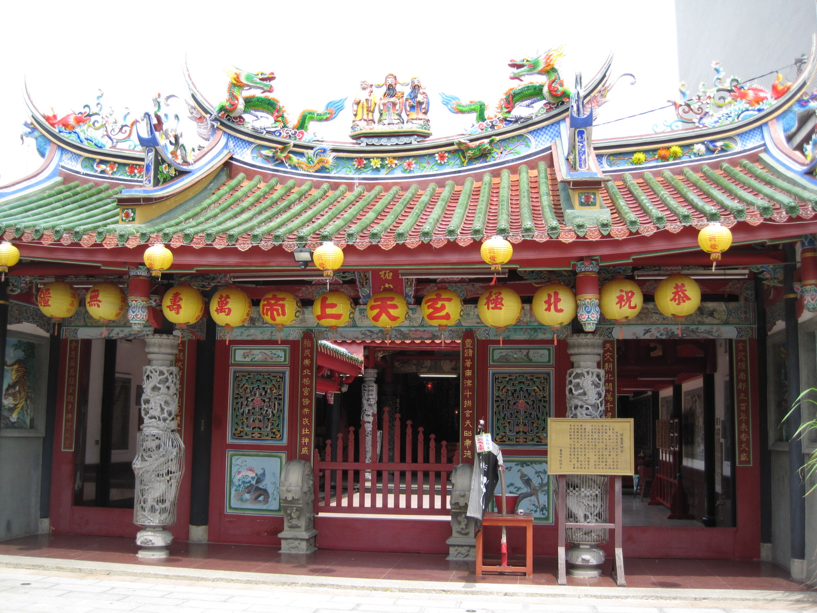 臺南開基靈祐宮正面